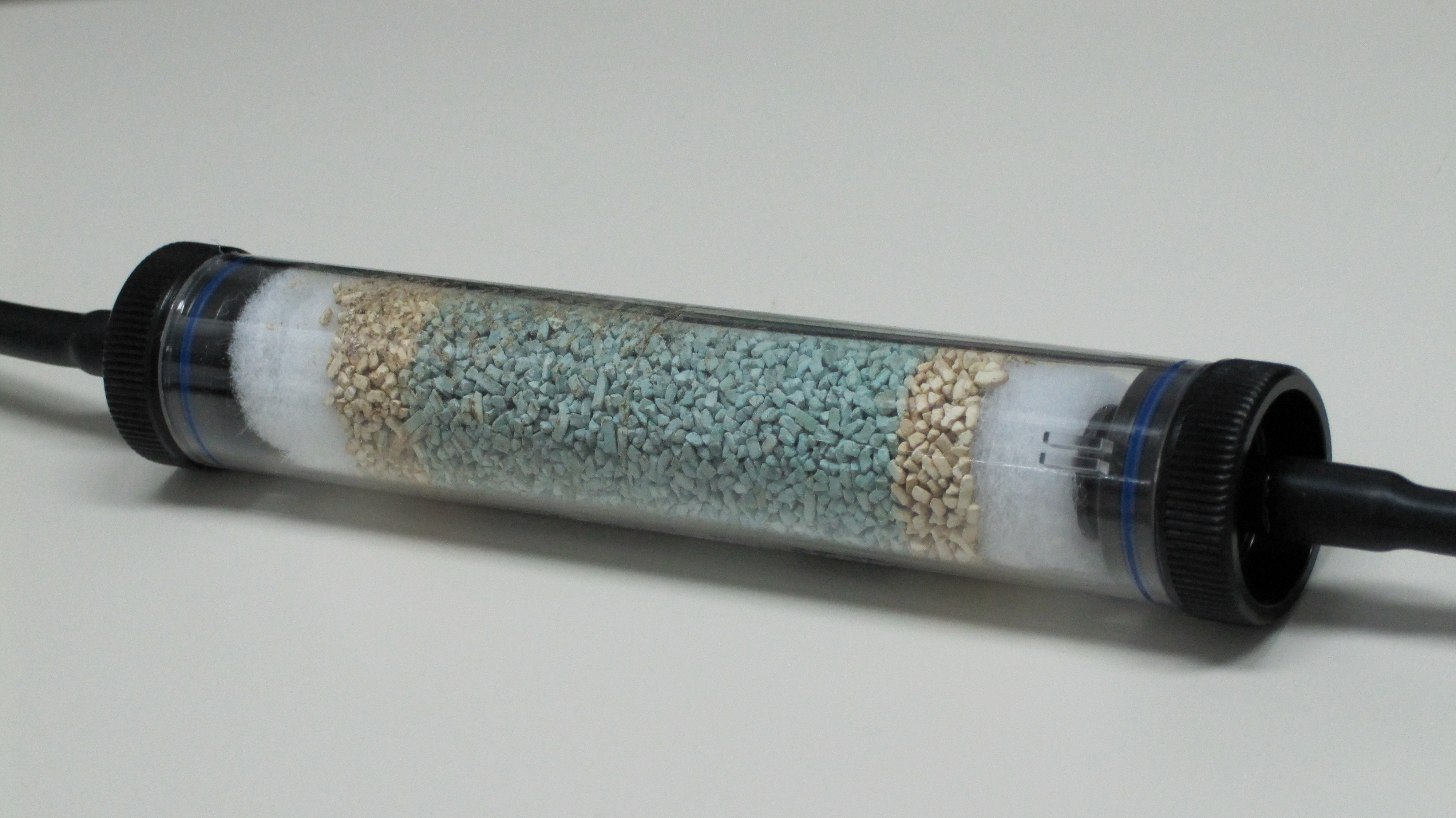 Eine Mischung aus Calciumhydroxid Ca(OH)2 und Natriumhydroxid NaOH entfernt in diesem Absorptionsfilter für Messgeräte den CO2-Anteil der Luft.